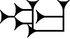 Cuneiform sign